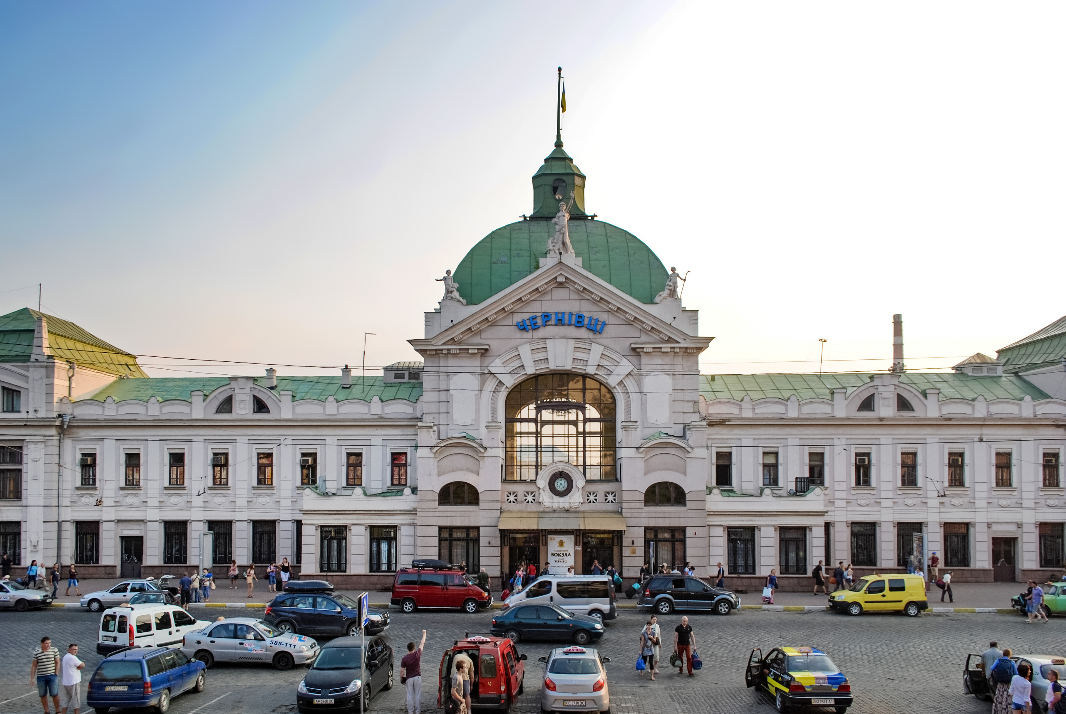 Залізничний вокзал, Чернівці, Гагаріна Юрія, 38